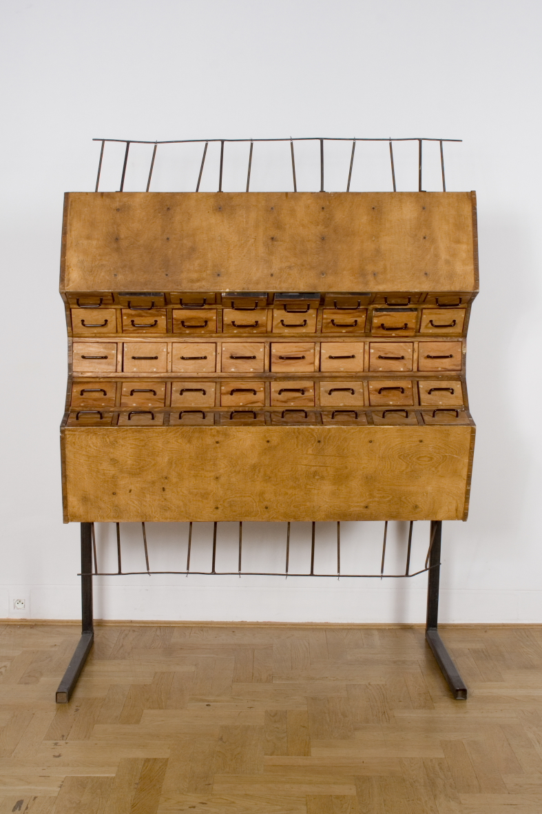 "40 Szuflad" - instalacja, fot. Zachęta.